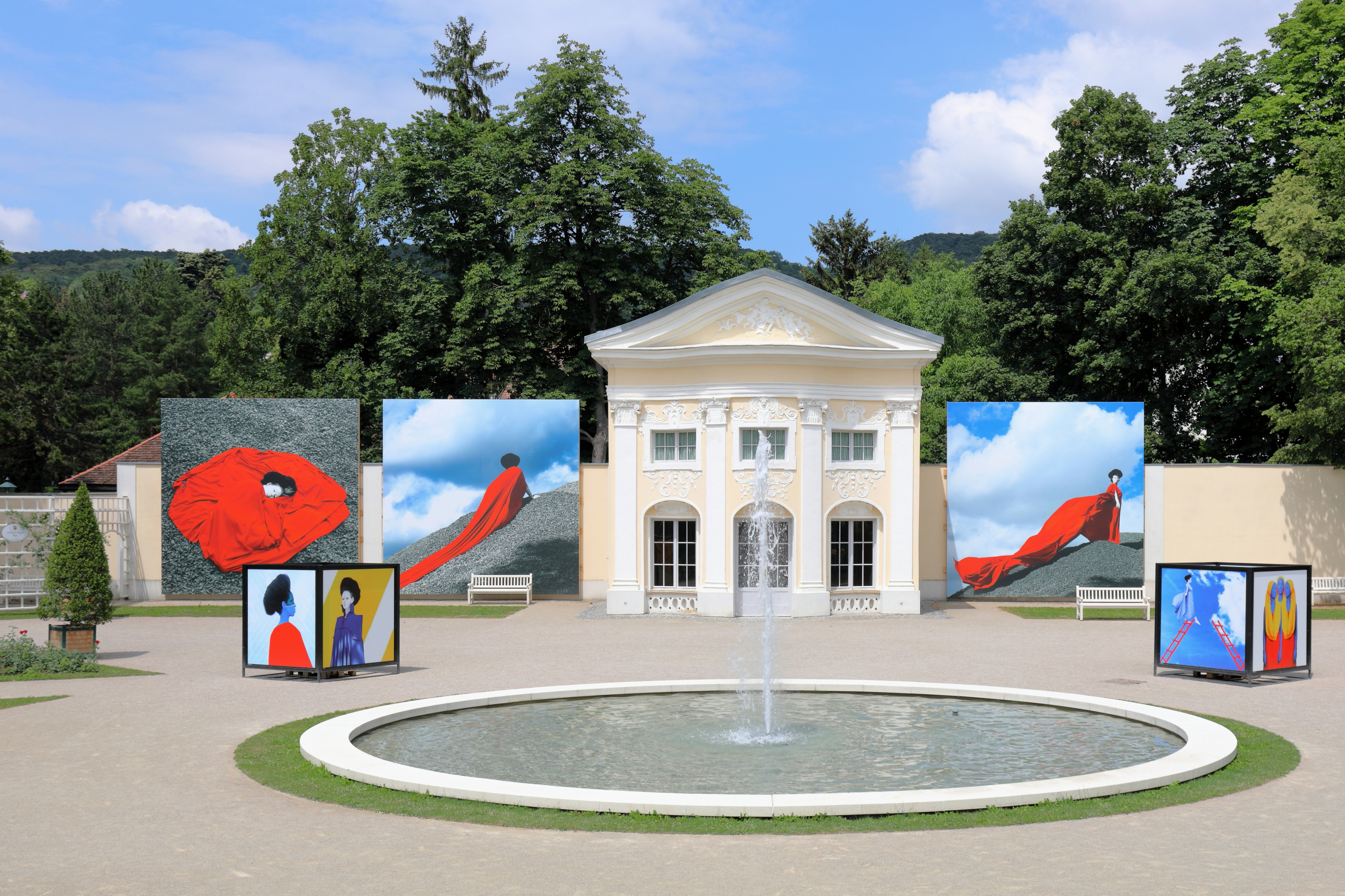 Fotofestival „La Gacilly-Baden Photo“ beim Pavillon der ehemaligen Orangerie im Doblhoffpark in der niederösterreichischen Stadt Baden. Bei dem Fotofestival unter dem Motto „I Love Africa“, das bereits 2017 in La Gacilly zu sehen war, werden rund 2.000 Fotos im öffentlichen Raum - vorwiegend im Doblhoffpark - gezeigt. Ins Leben gerufen wurde das Fotofestival von Yves Rochers Sohn Jacques, der ebenso wie einst sein Vater Bürgermeister seines Heimatorts La Gacilly ist, und dort seit 2003 jährlich das Fotofestival präsentiert.